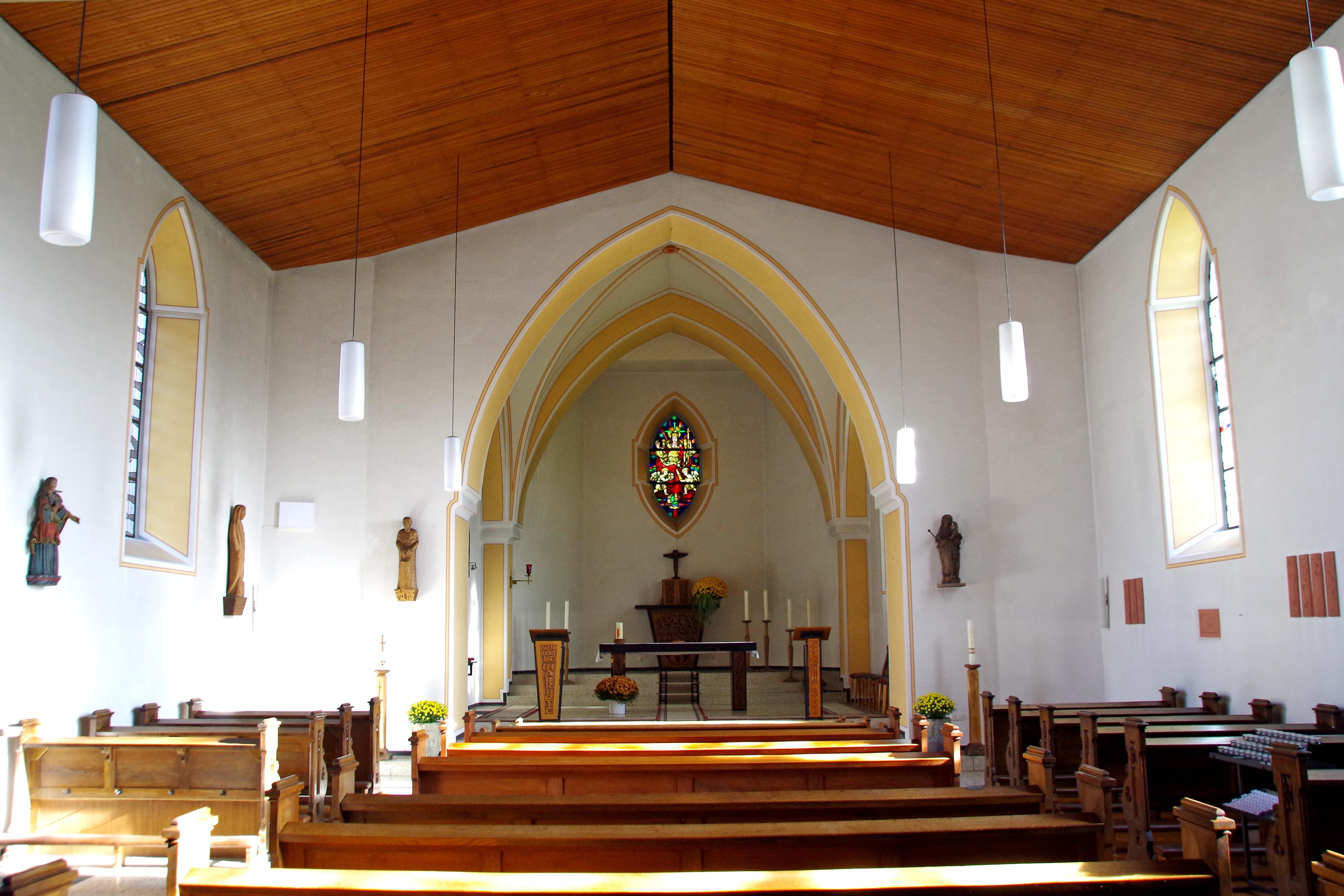 St. Agatha (Alendorf), Blick ins Kirchenschiff